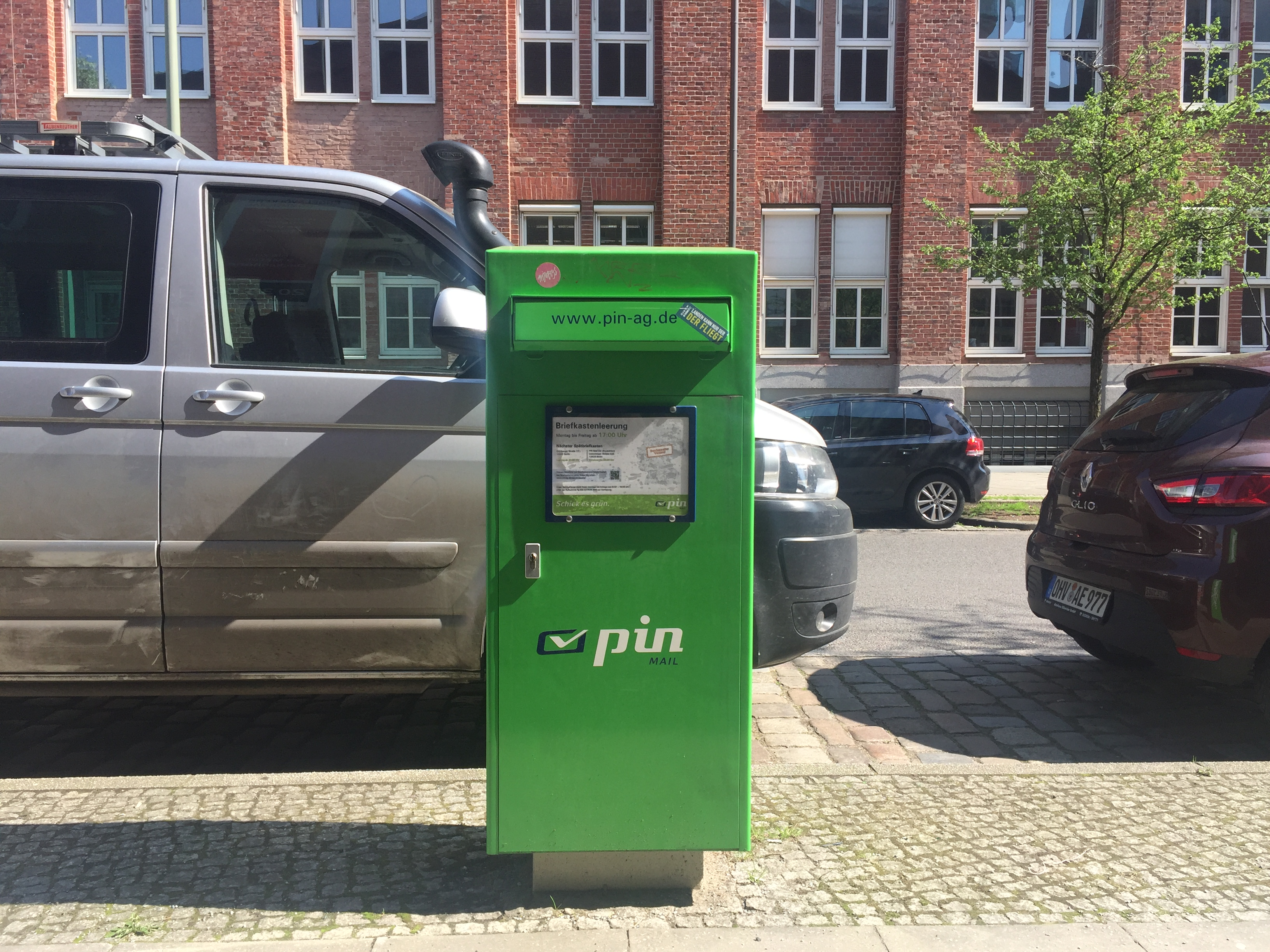 PIN AG letter box in Berlin-Friedrichshain